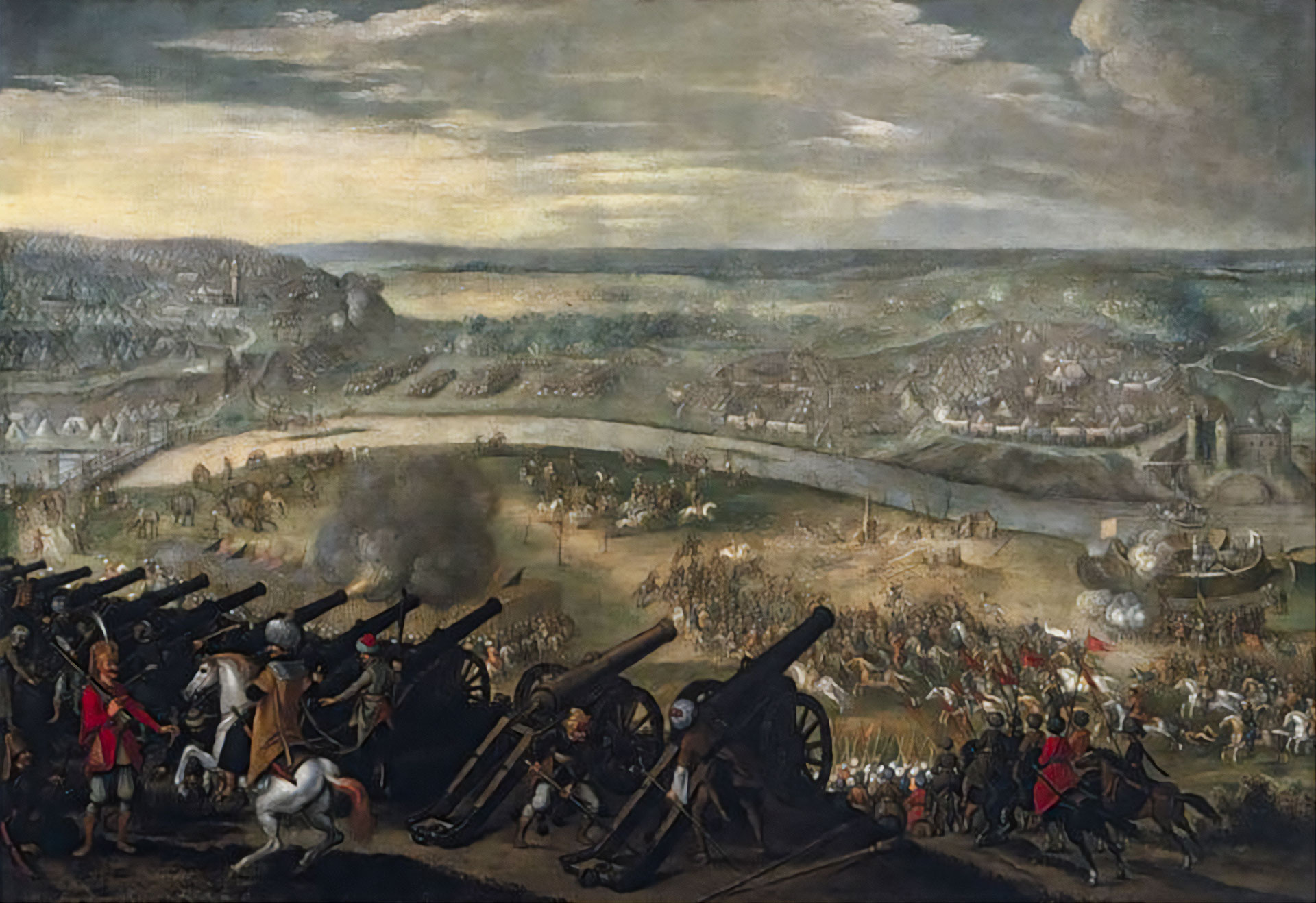 Siege of Esztergom 1543